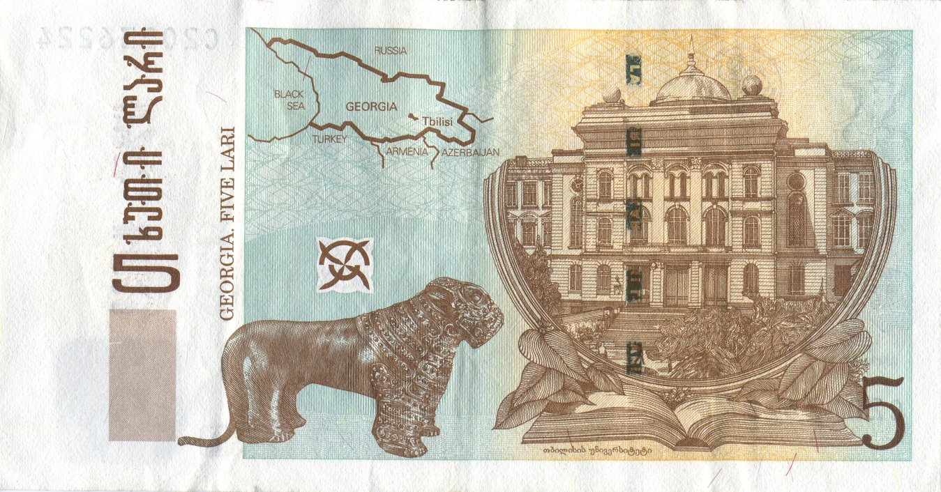 5 Georgian lari (Reverse)